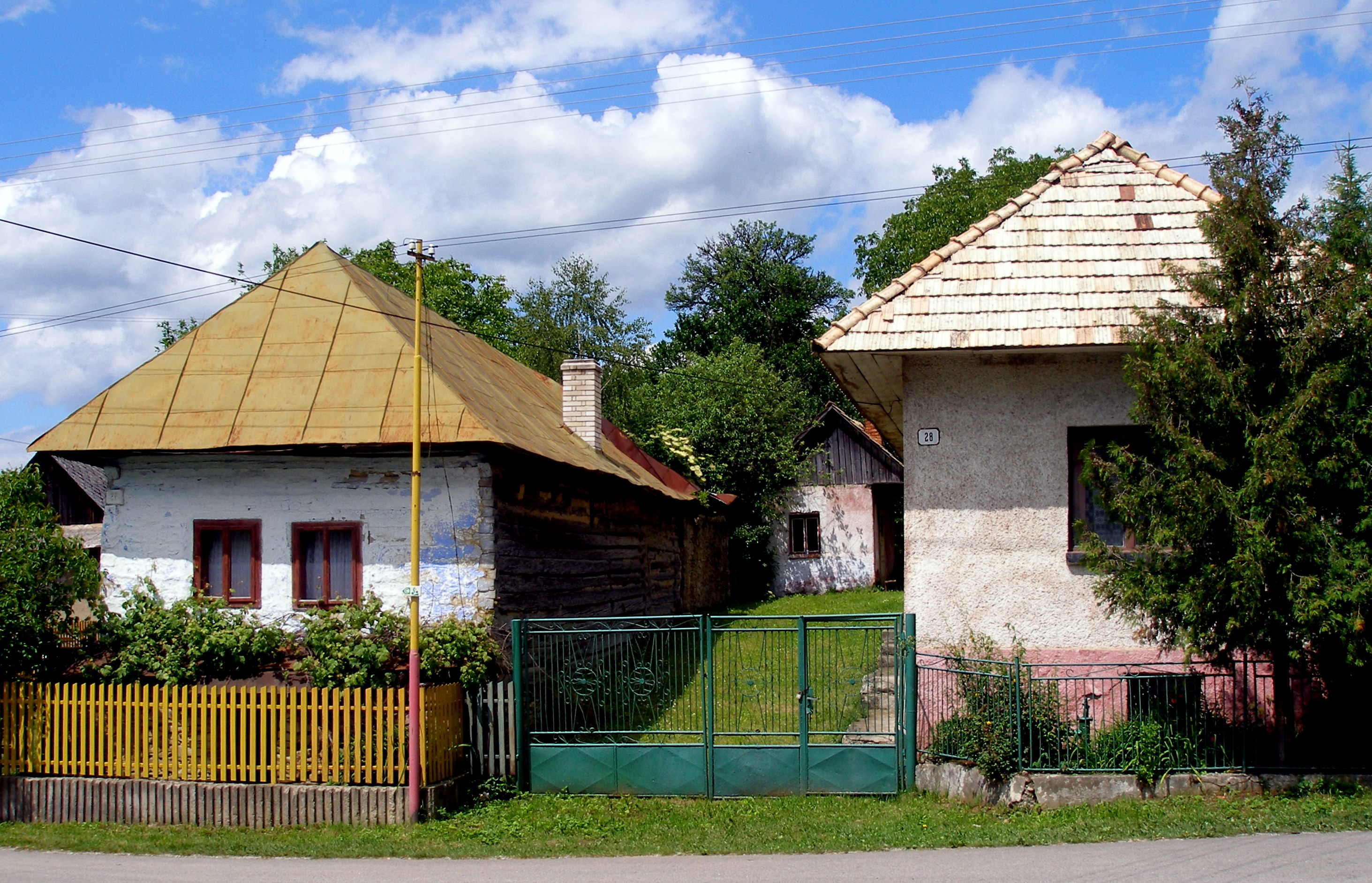 Obec Jakovany okres Sabinov.